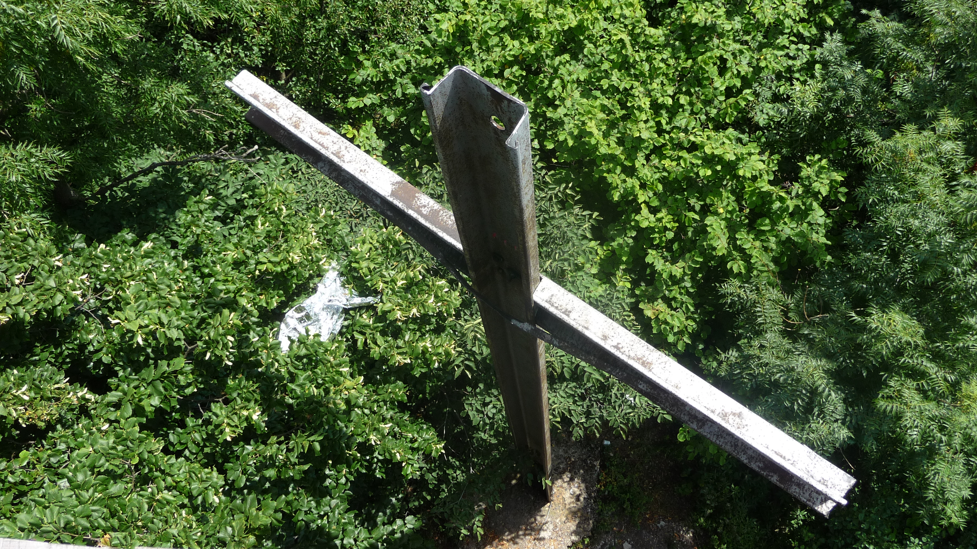 Kríž "Bože ochraňuj turstov" na Marháte.